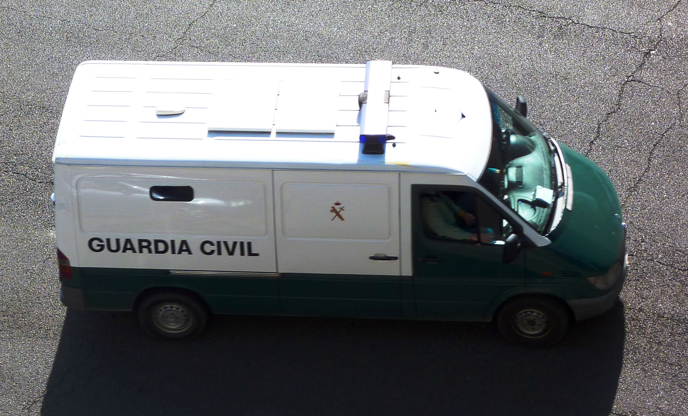 Mercedes-Benz Sprinter de la Guardia Civil.